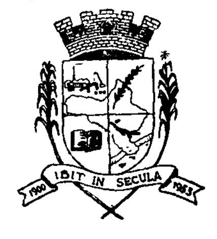 Antigo e Primeiro Brasão da cidade de Jacarezinho, criado e adotado a partir da lei 167 de 18 de dezembro de 1953